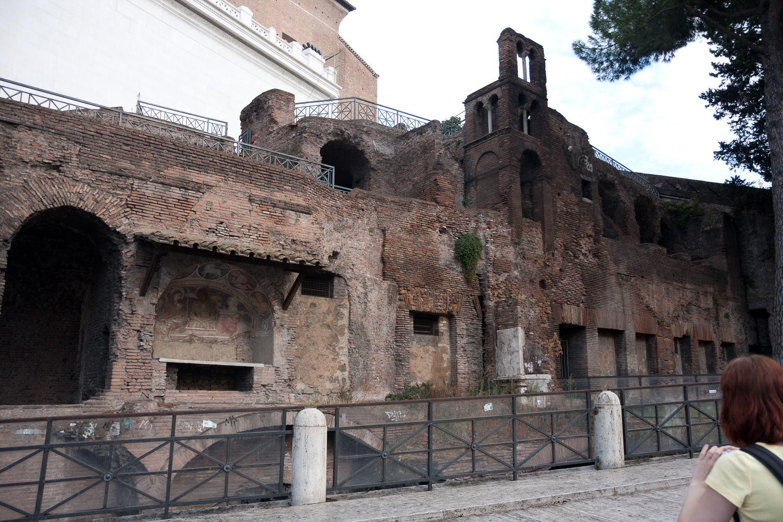 Insula Romana